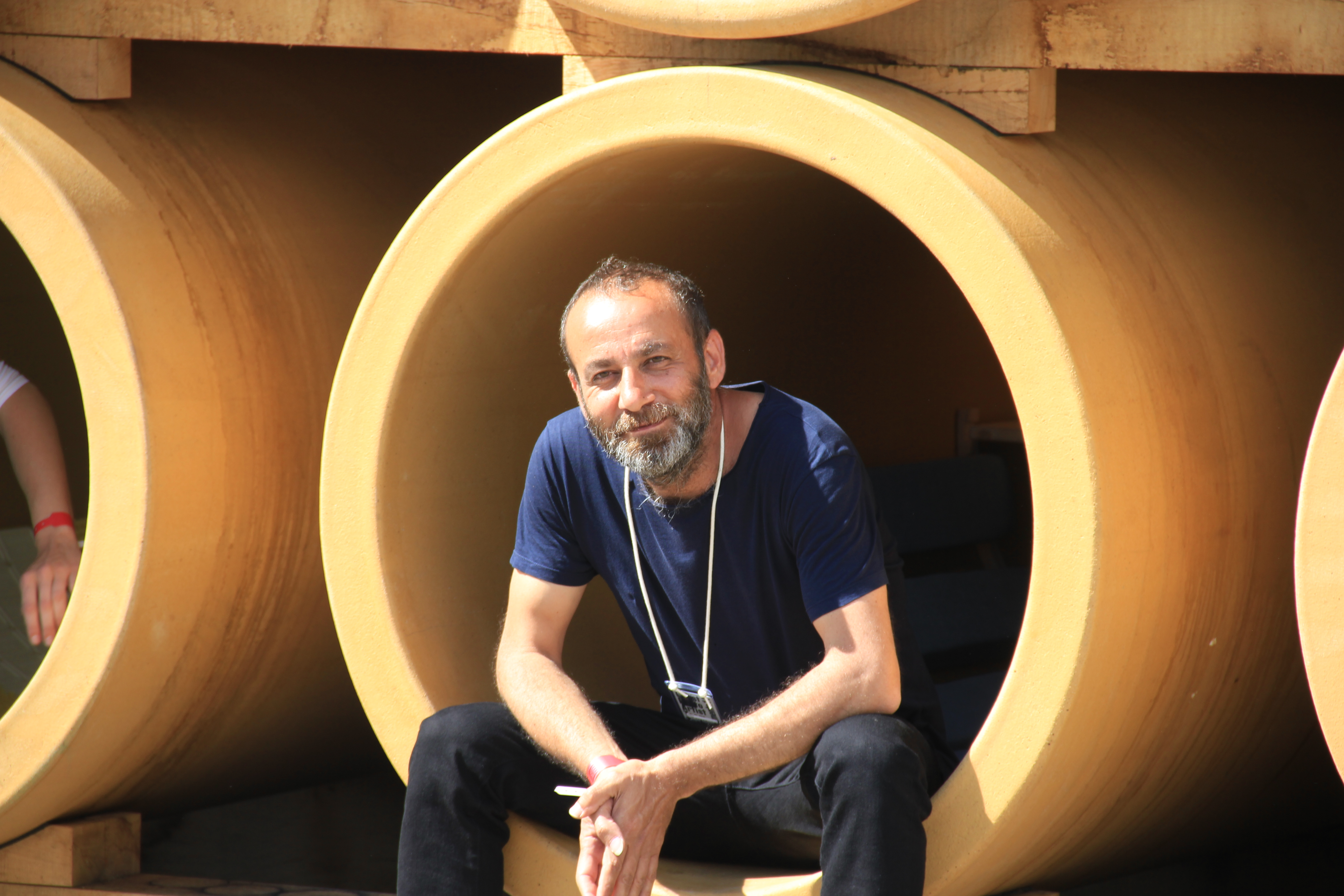 Künstler Hiwa K. in seinem Kunstwerk sitzend